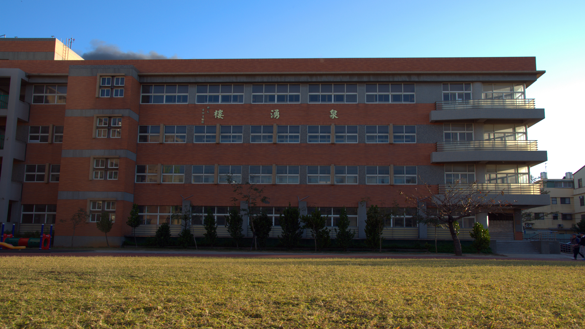 中文（台灣）: 2004年四月建成之南邊校舍-泉湧樓。